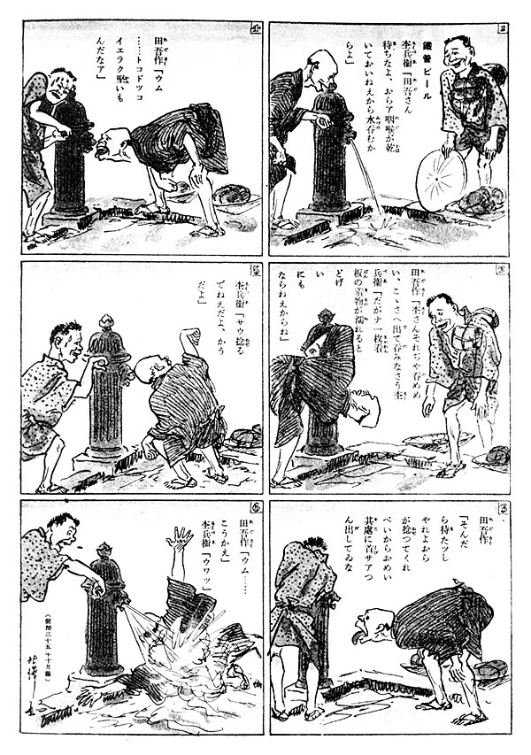 Rakuten Kitazawa(1876-1955)'s comic strip Tagosaku to Mokube no Tokyo Kenbutsu